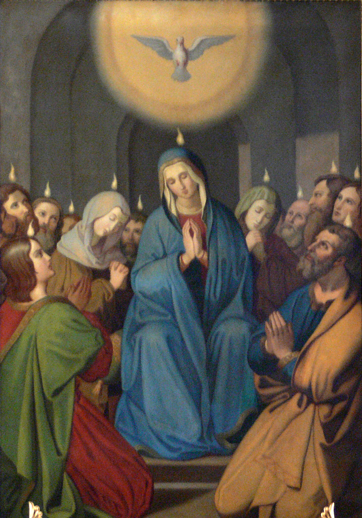 Kath. Pfarrkirche St. Gordian und Epimachus, Merazhofen, Stadt Leutkirch im Allgäu, Landkreis Ravensburg Josephsaltar, Altarblatt "Pfingstwunder" von Fidelis Schabet, 1867